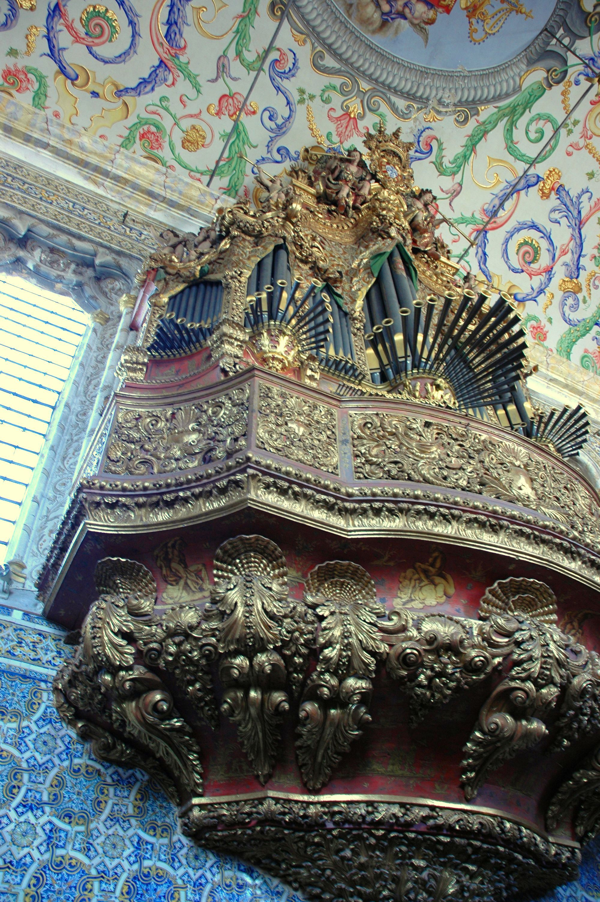 Universitat de Coïmbra - Orgue de la capella